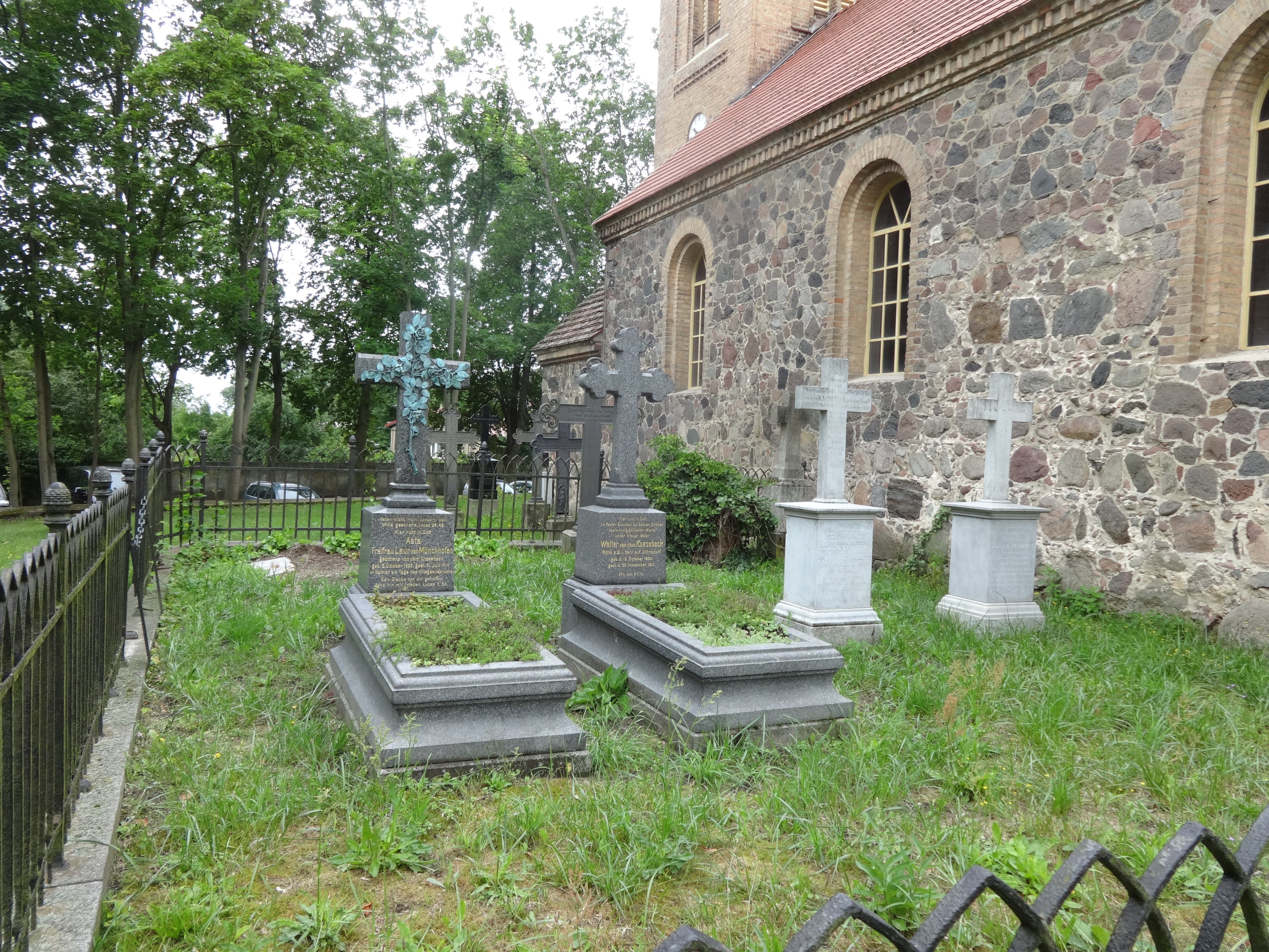 Die Dorfkirche Jühnsdorf ist eine Feldsteinkirche, die vermutlich im 14. Jahrhundert errichtet wurde. 1869 baute die der Baumeister Klehmet aus Zossen um und erweiterte sie unter anderem um eine halbkreisförmige Apsis und den Westturm. Die Kirchenausstattung stammt im Wesentlichen aus dem 19. Jahrhundert.